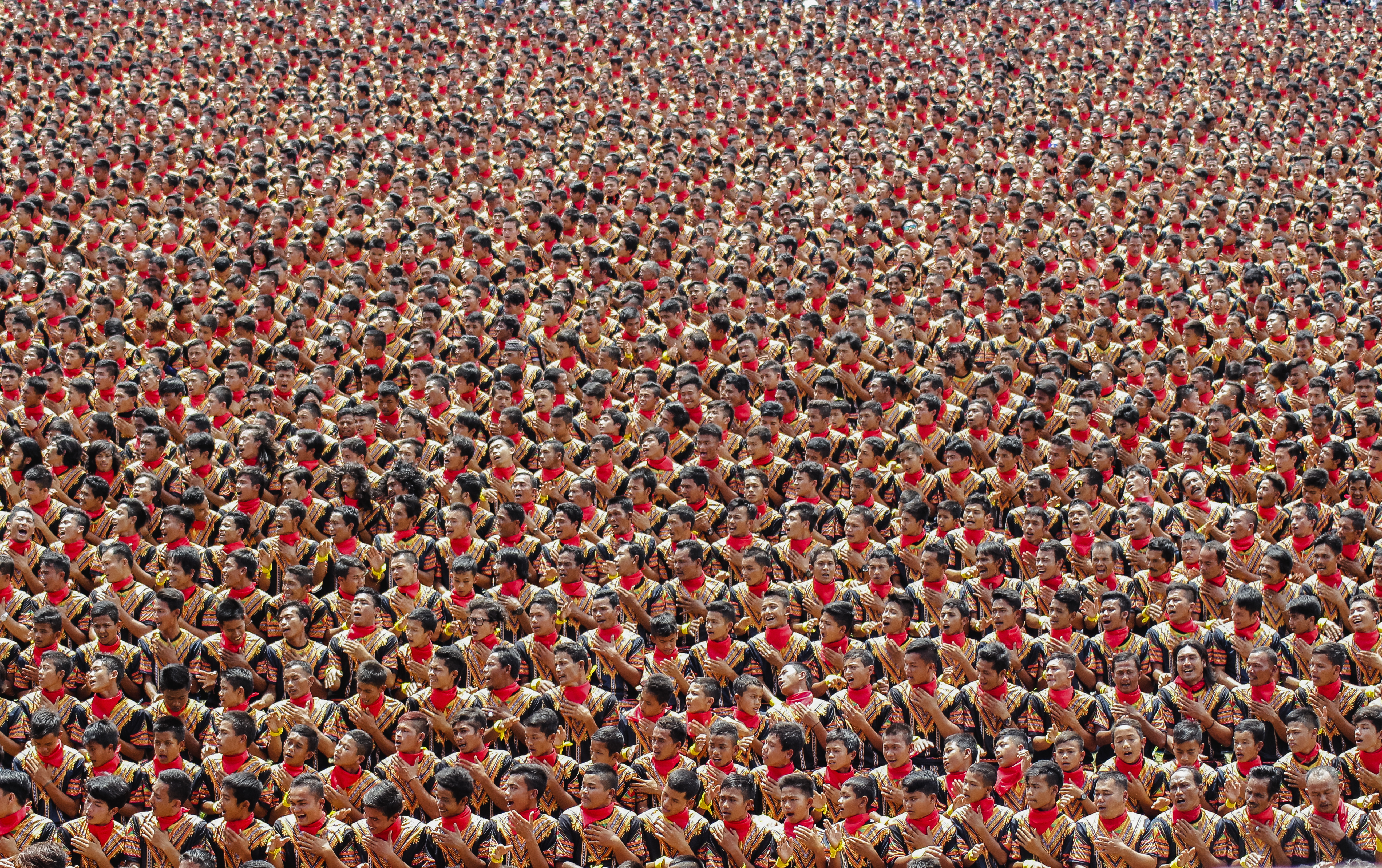 Pagelaran Tari Saman terbesar di dunia. 4 kabupaten, 11 kecamatan, 145 desa, 12.262 penari. Saman yang mengusung Tema "Saman Pengawal Leuser" ini dalam rangka menyambut 17 Agustus, merayakan 6 tahun penetapan saman sebagai warisan budaya tak benda dari UNESCO, juga utk memecahkan rekornya sendiri. "Saman itu asalnya dari hati nurani orang Gayo"